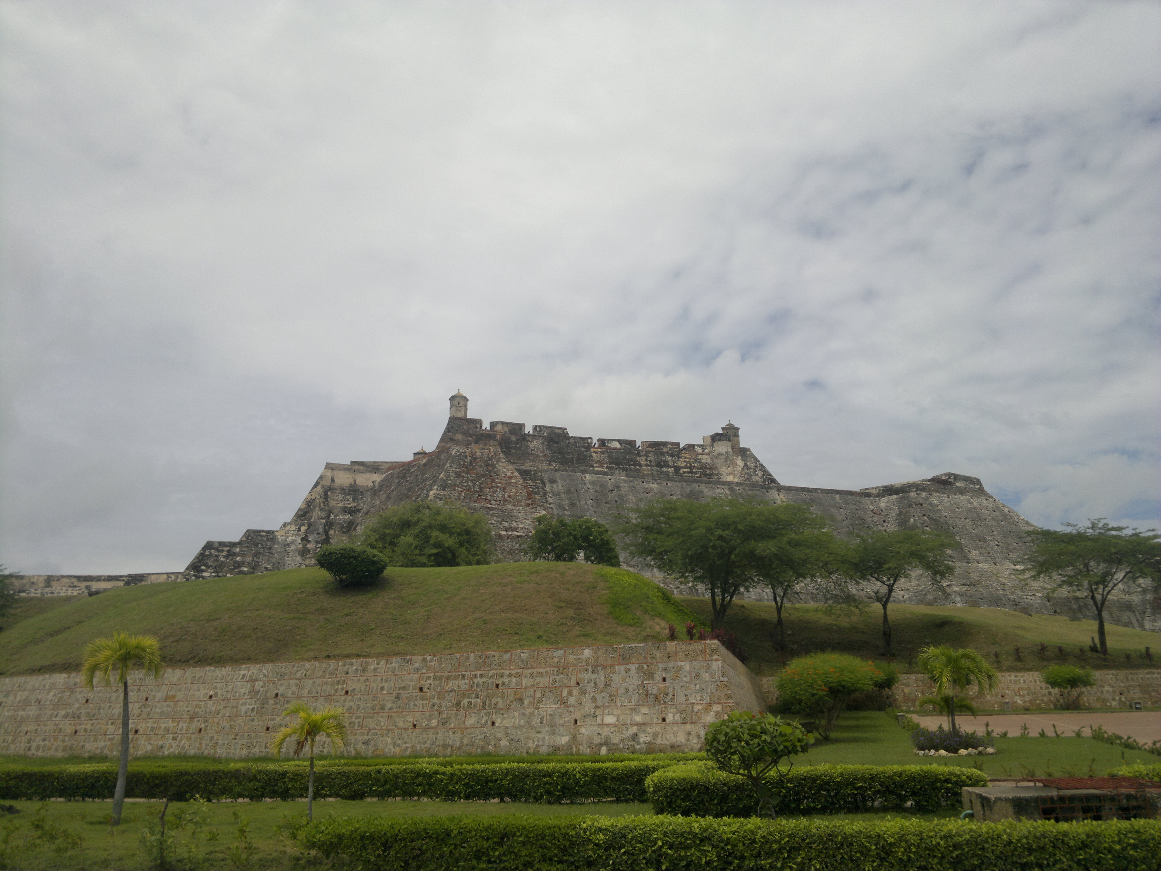 Castillo de San Felipe de Barajas y las baterías colaterales Fuerte de San Felipe de Barajas